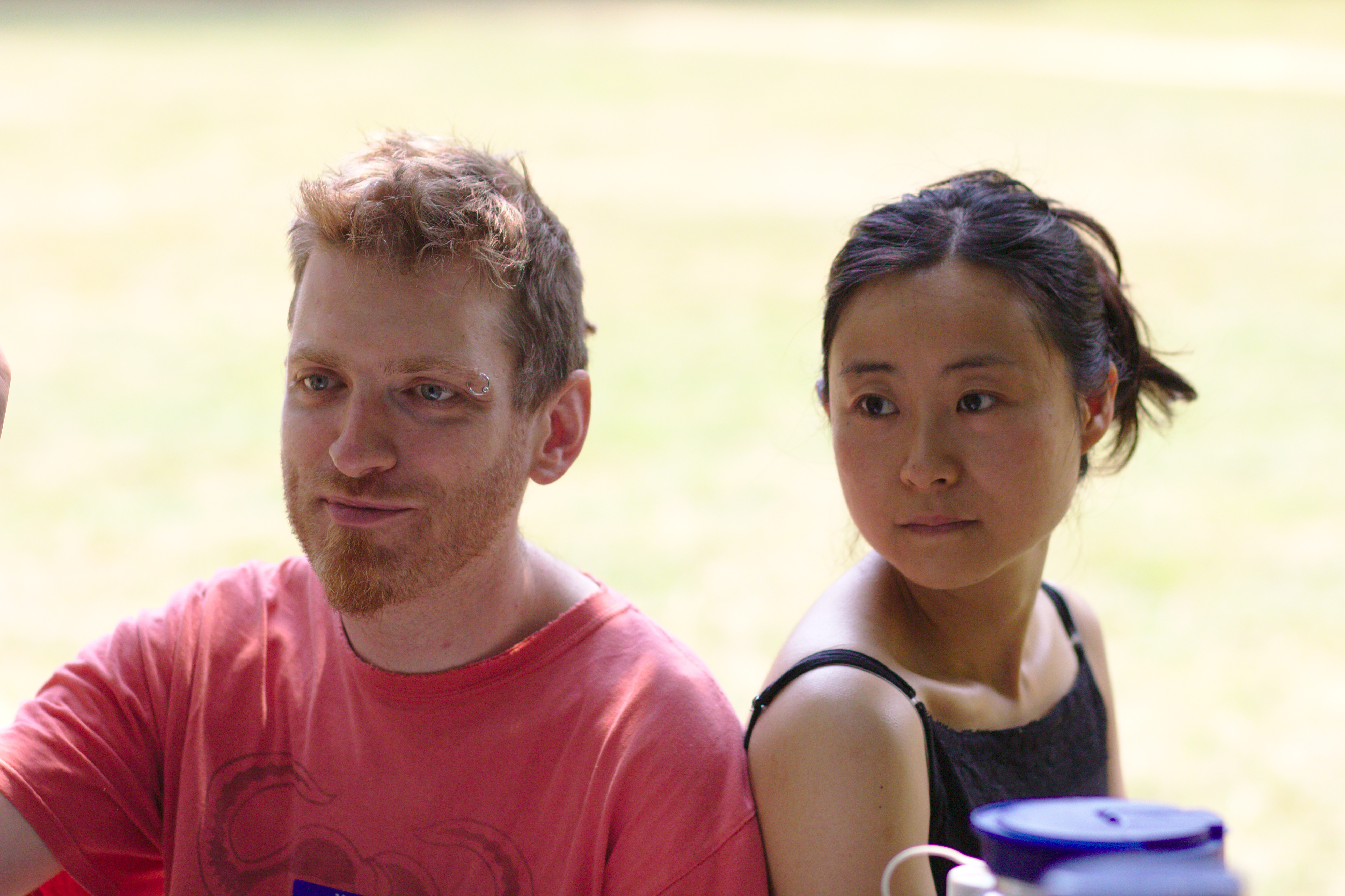 IMG_8339.20150705